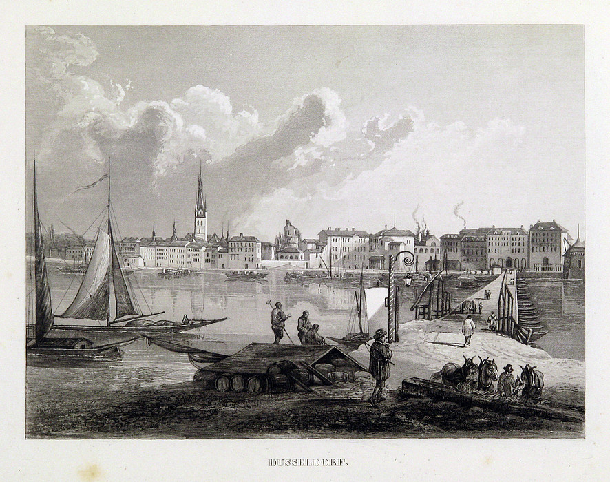 Düsseldorf, aus: L. Bleuler, Le Rhin. Laufen ca. 1830